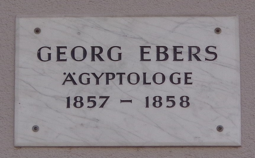 Göttinger Gedenktafel für Georg Ebers, Ägyptologe und Schriftsteller (Weender Straße 58)